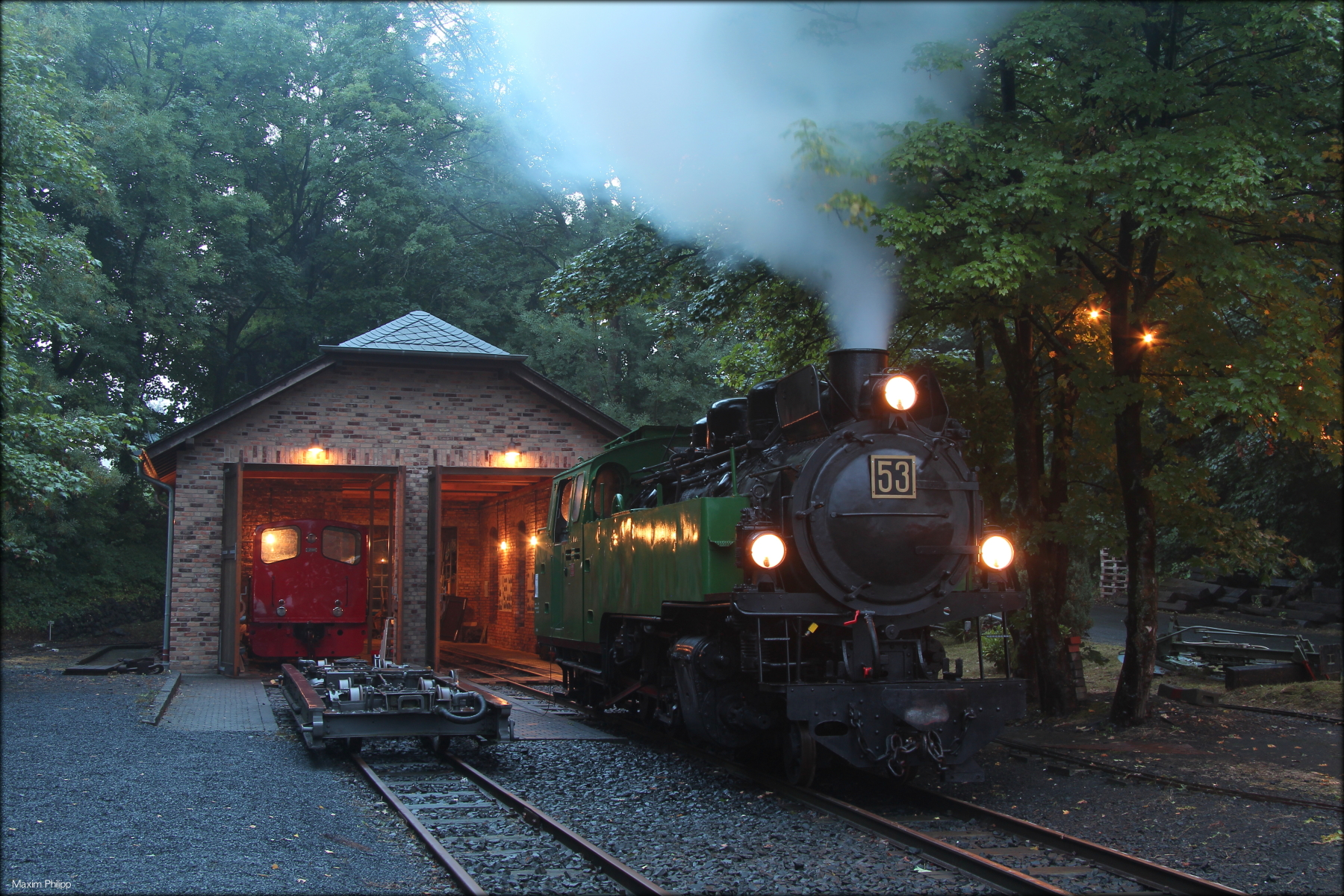 Das RSE-Museum in Asbach mit Lok 53 und V13 zum Sommerfest 2013.